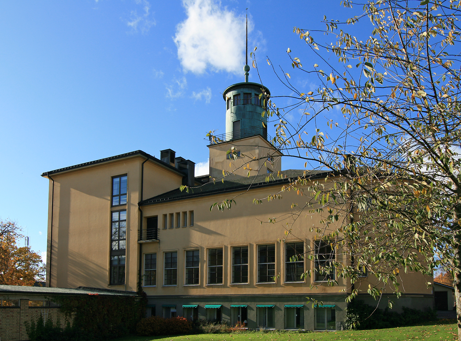 Solbergagymnasiet, Arvika.